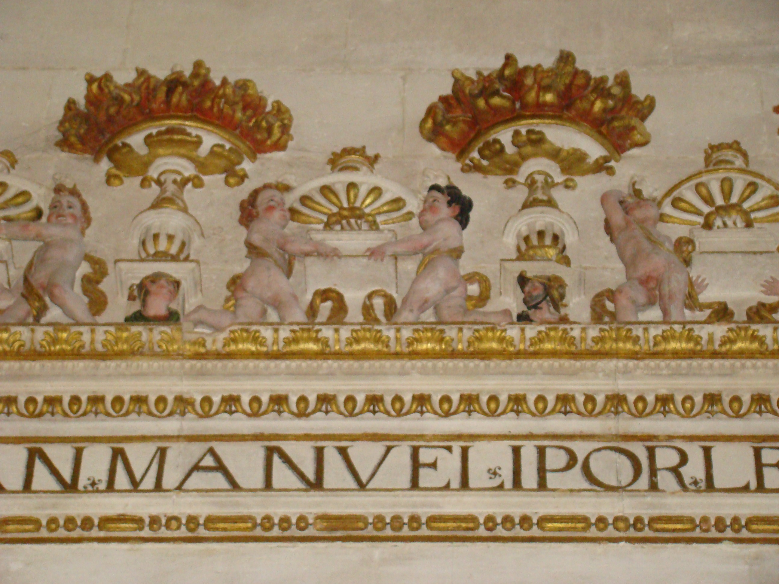 Capilla de los Manuel en la iglesia del convento de San Pablo en la localidad de Peñafiel en Valladolid, España. Los muros del recinto están recorridos a media altura por una cornisa. ). Sobre la cornisa se desarrolla una crestería formada por figuras de angelitos que sostienen flameros que representan una alegoría de la luz eterna que alumbra a los muertos que yacen en el recinto. Bajo la cornisa puede leerse una inscripción sobre la construcción de la capilla y su fundador.